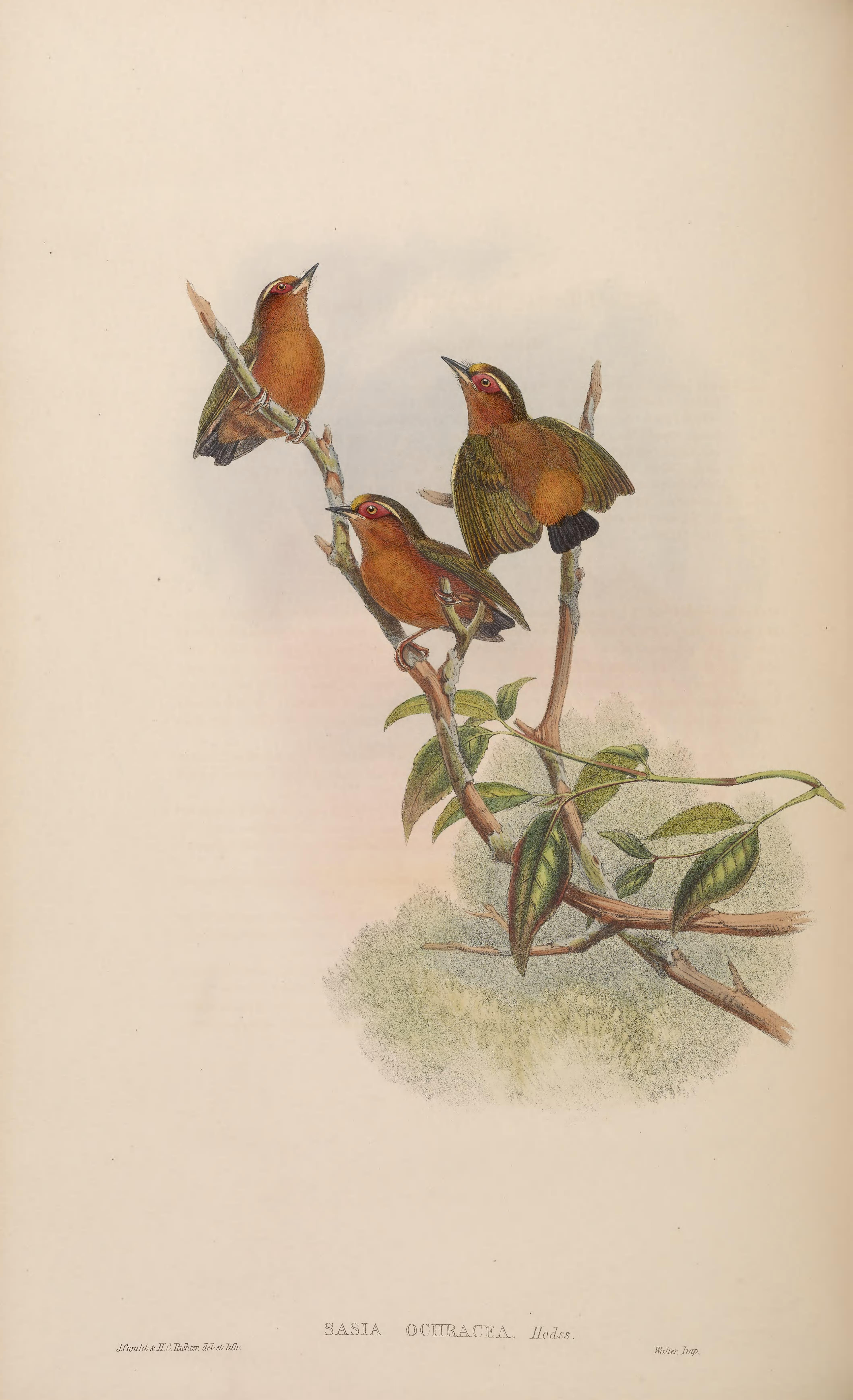 Sasia ochracea